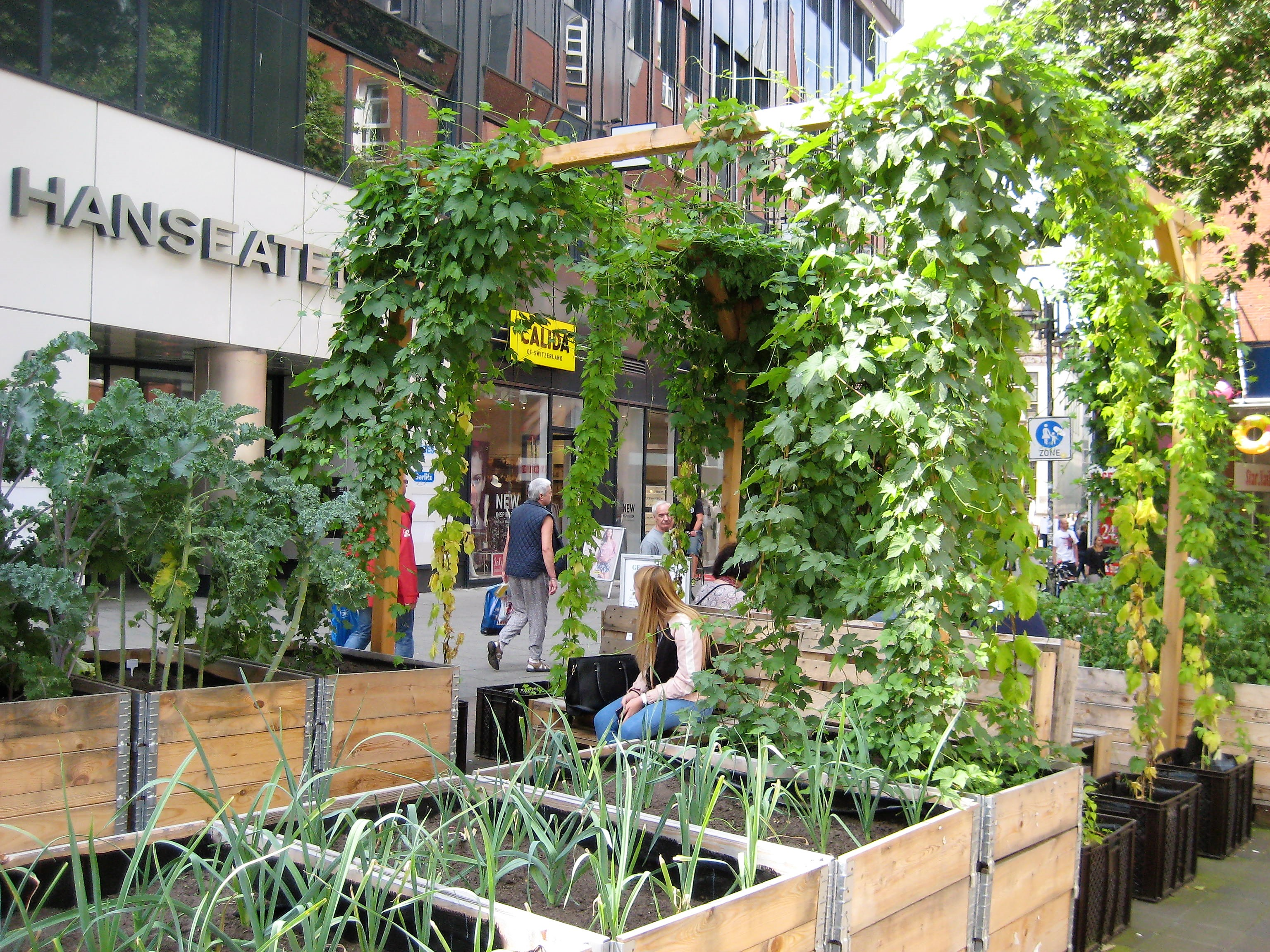 Hochbeet-Projekt („Urban Gardening“) der City Initiative Bremen und der Wirtschaftsförderung Bremen auf dem Hanseatenhof in der Bremer Innenstadt (sowie im angrenzenden CityLab). Ausführung: „Bremer Gemüsewerft“ der G.i.B. – Gesellschaft für integrative Beschäftigung mbH, Bremen. Hier Blick in Richtung Bremer Carree. Vorne: Zwiebeln; hinten links: Braunkohl und Grünkohl; rechts (Pergolabepflanzung): Hopfen.